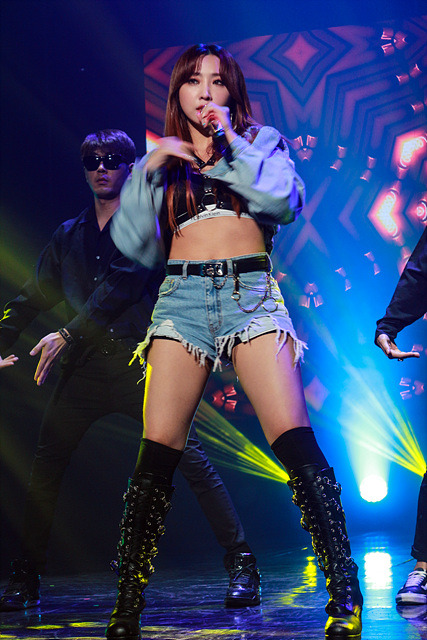 09월 26일 뮤콘 쇼케이스 MUCON Showcase 공민지(MINZY)